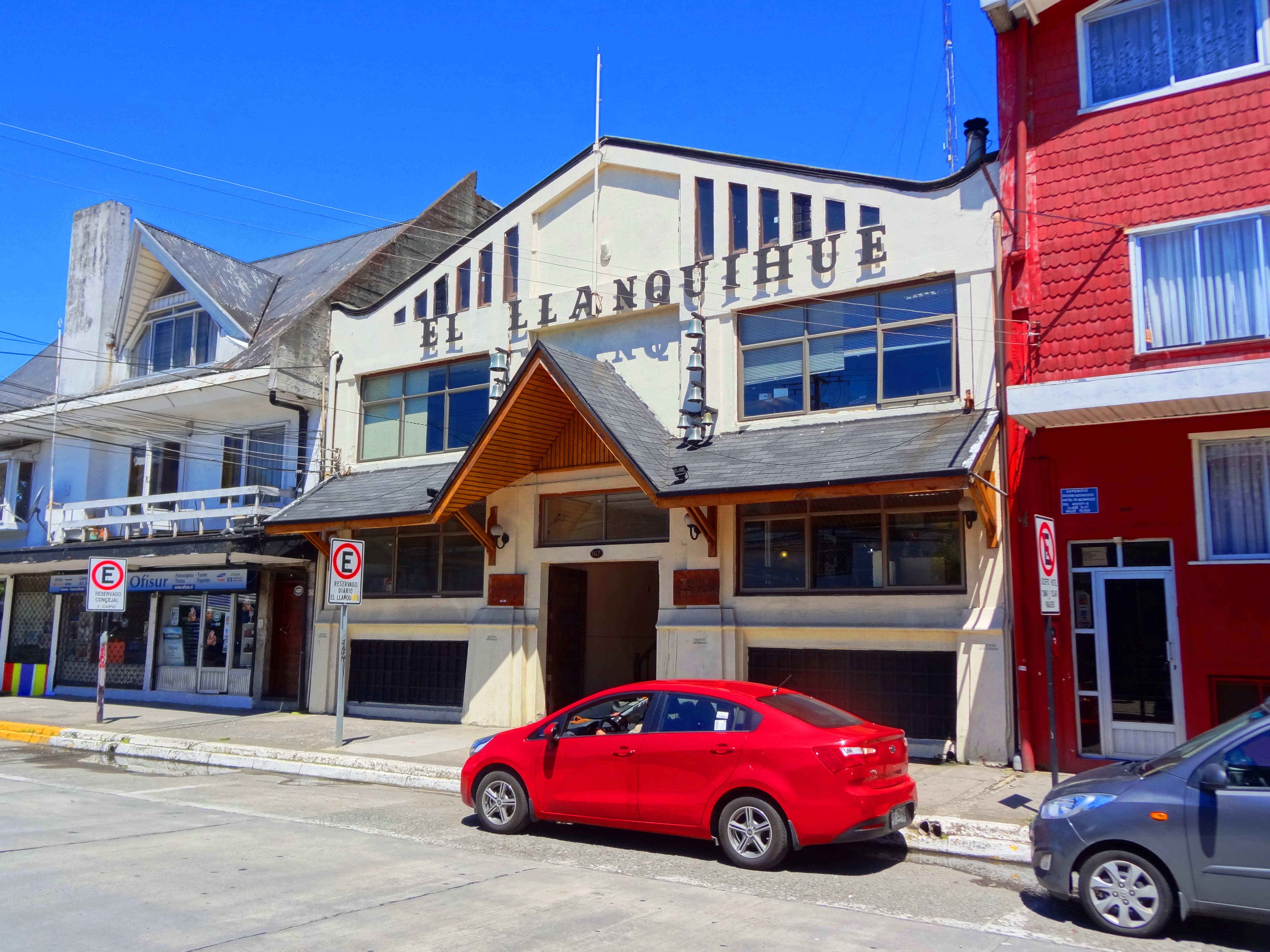 Edificio de El Llanquihue, periódico de la ciudad de Puerto Montt